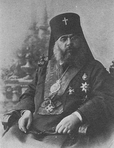 Архиепископ Николай (в миру Михаил Захарович Зиоров)